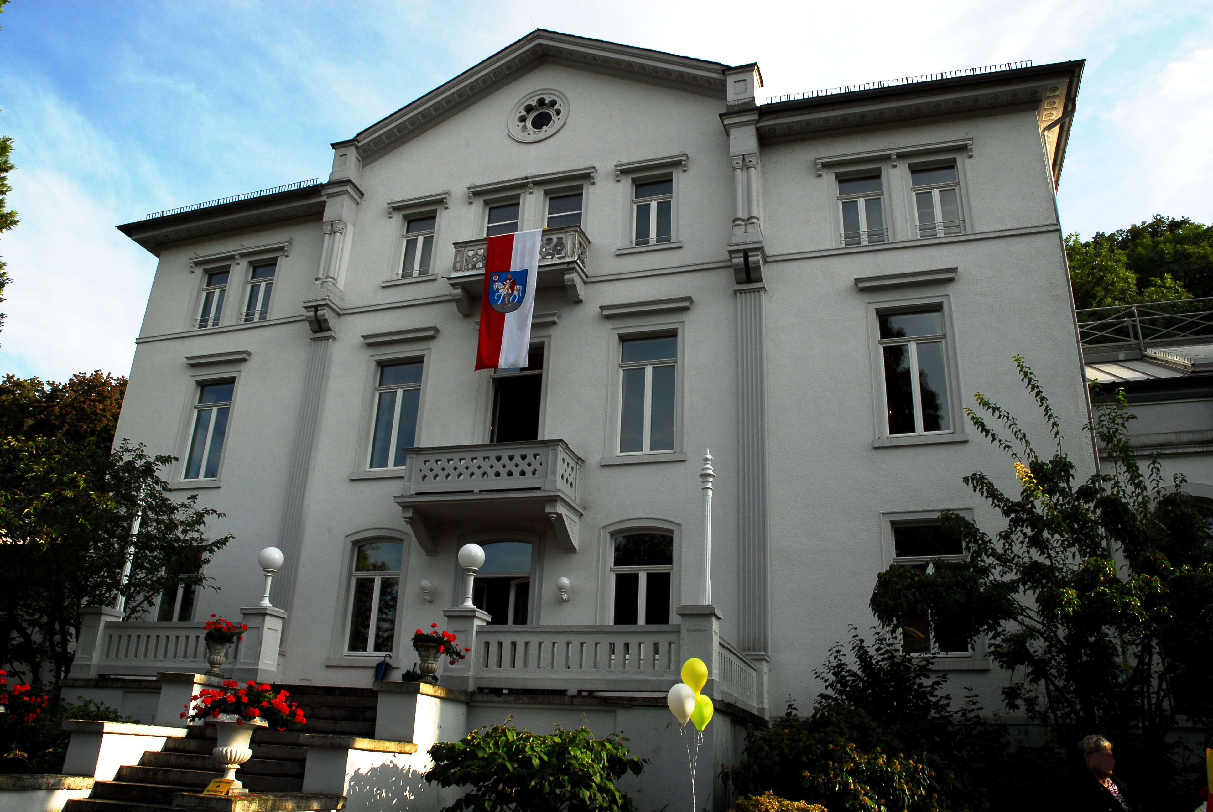 Villa Sachsen in Bingen am Rhein, Mainzer Straße 184: dreigeschossiges spätklassizistische Herrenhaus von 1843.